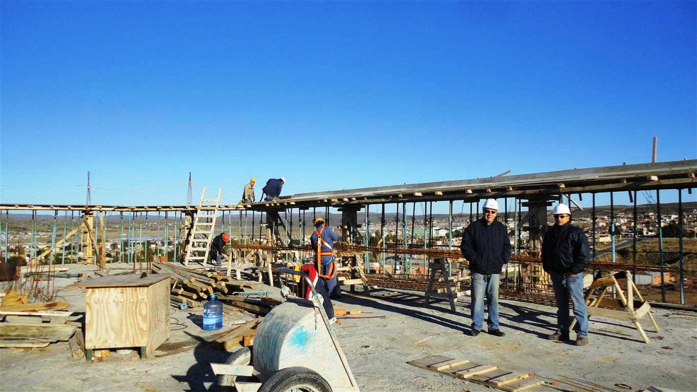 Torre Cortaza obra